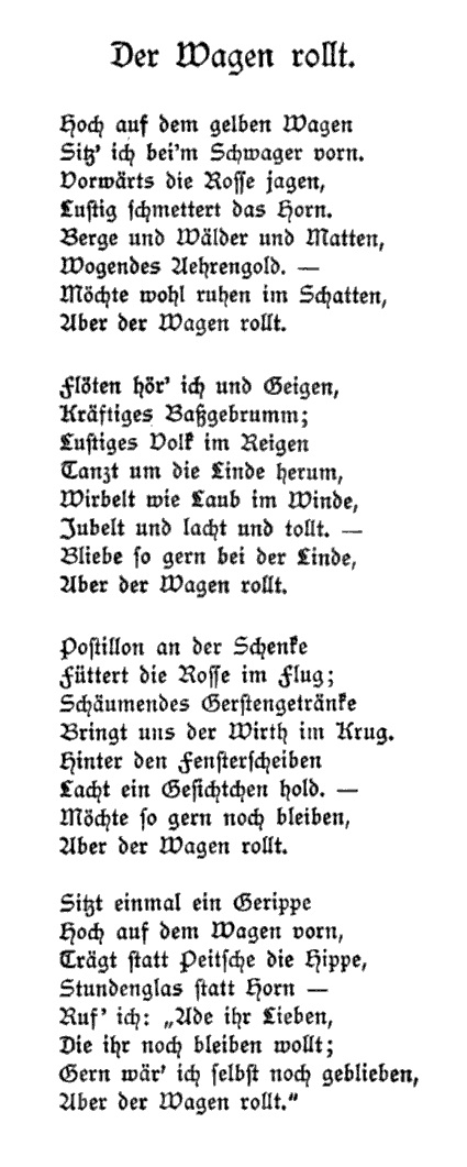 Hoch auf dem gelben Wagen, Druckfassung 1907